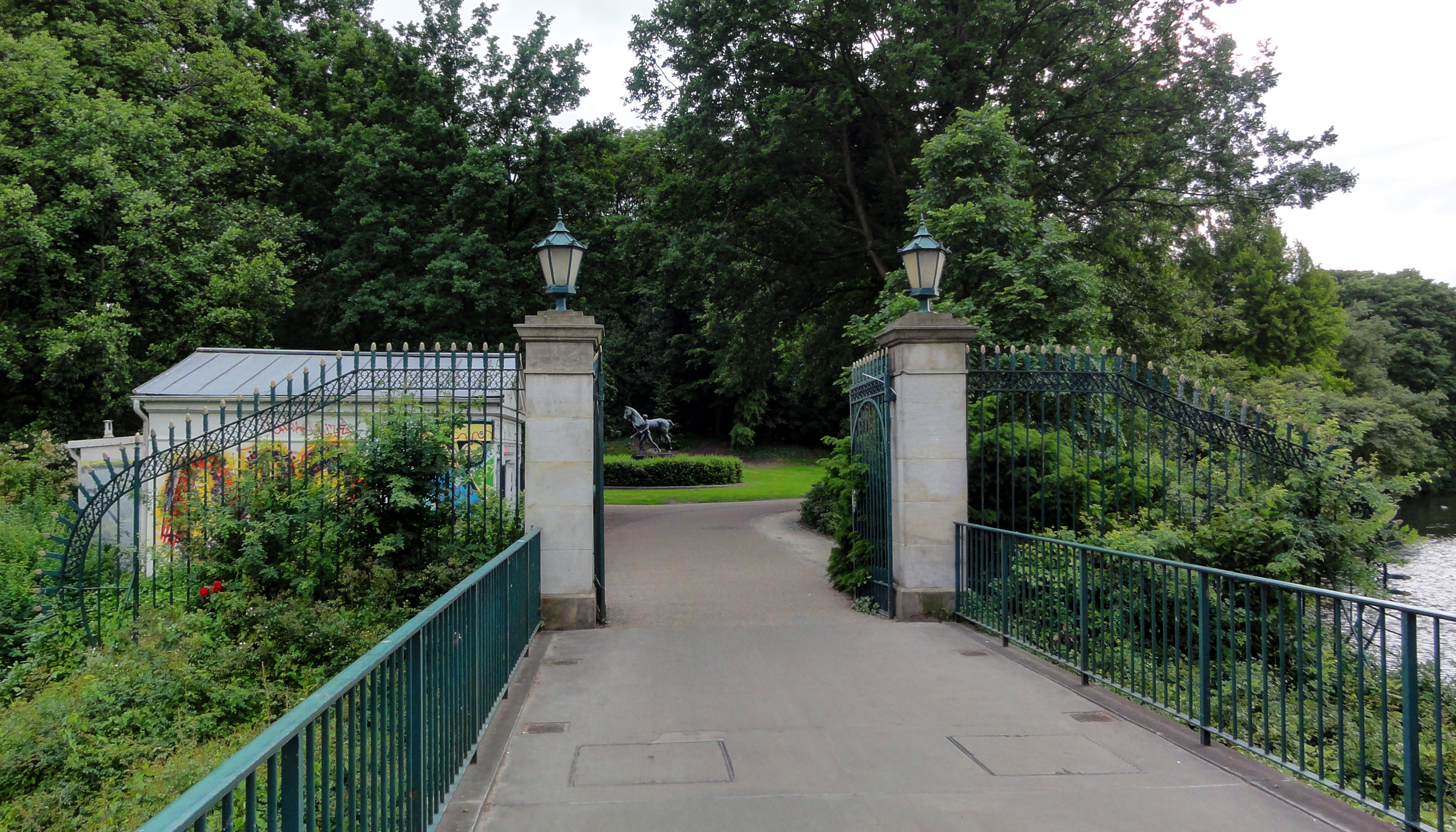 Bischofstor in Bremen, Richtung WallanlagenDas abgebildete Objekt ist ein geschütztes Kulturdenkmal in der Freien Hansestadt Bremen, mit der Nr. 1193,T006 beim Landesamt für Denkmalpflege registriert.